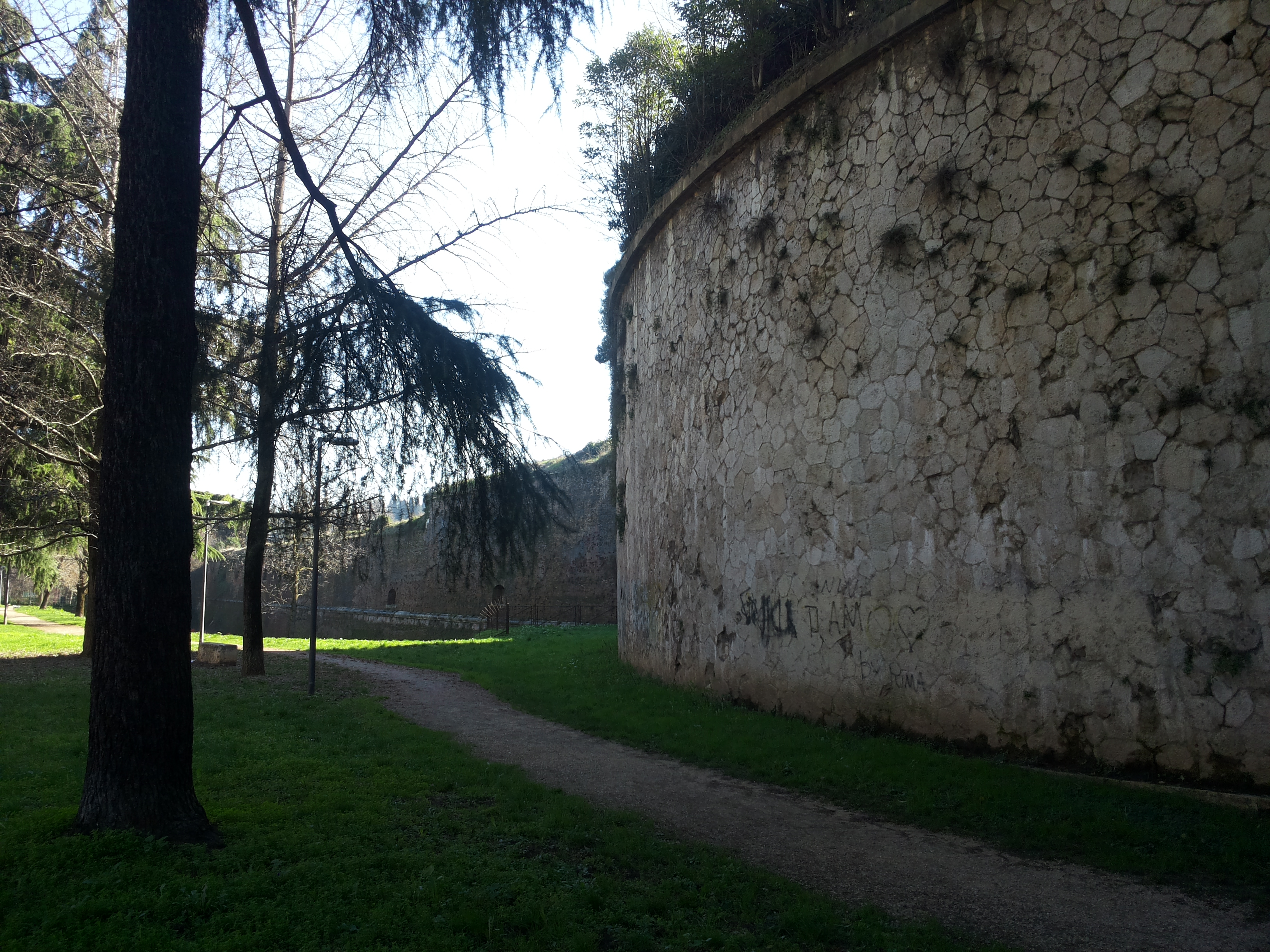 Rondella San Giorgio (Verona)